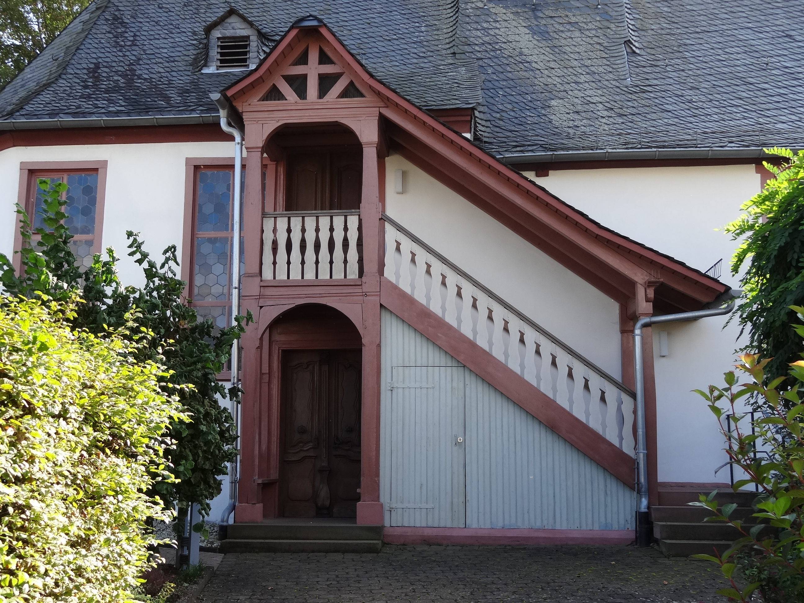 Ev. Pfarrkirche Ebersgöns